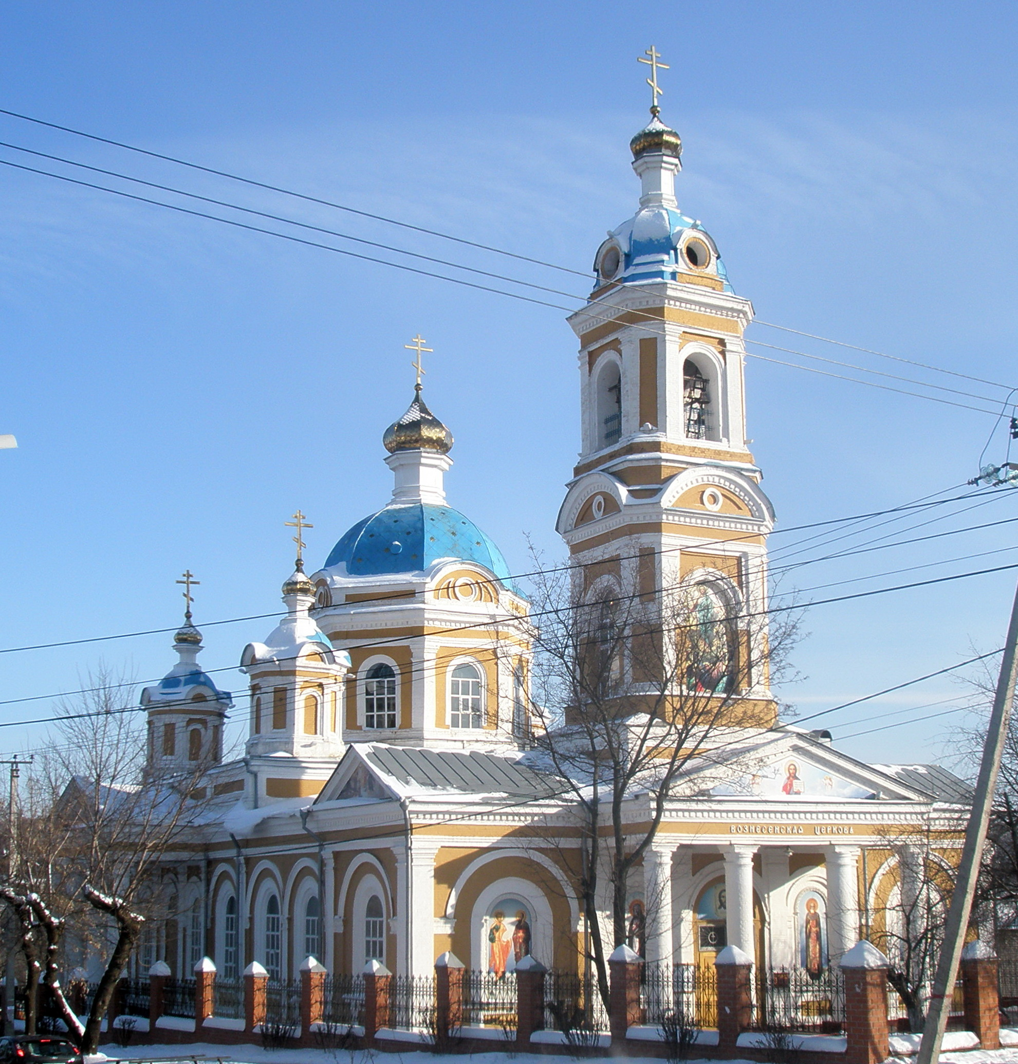 Храм Вознесения Господня в Центральном округе города Курска